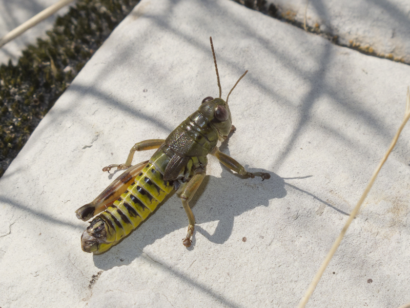 Podisma silvestrii male, location: Italy -Ussita